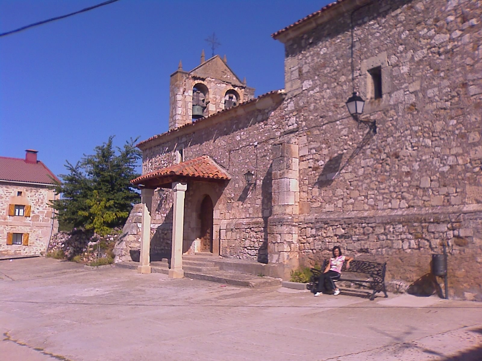 Iglesia de Condemios de Abajo (Guadalajara, España)